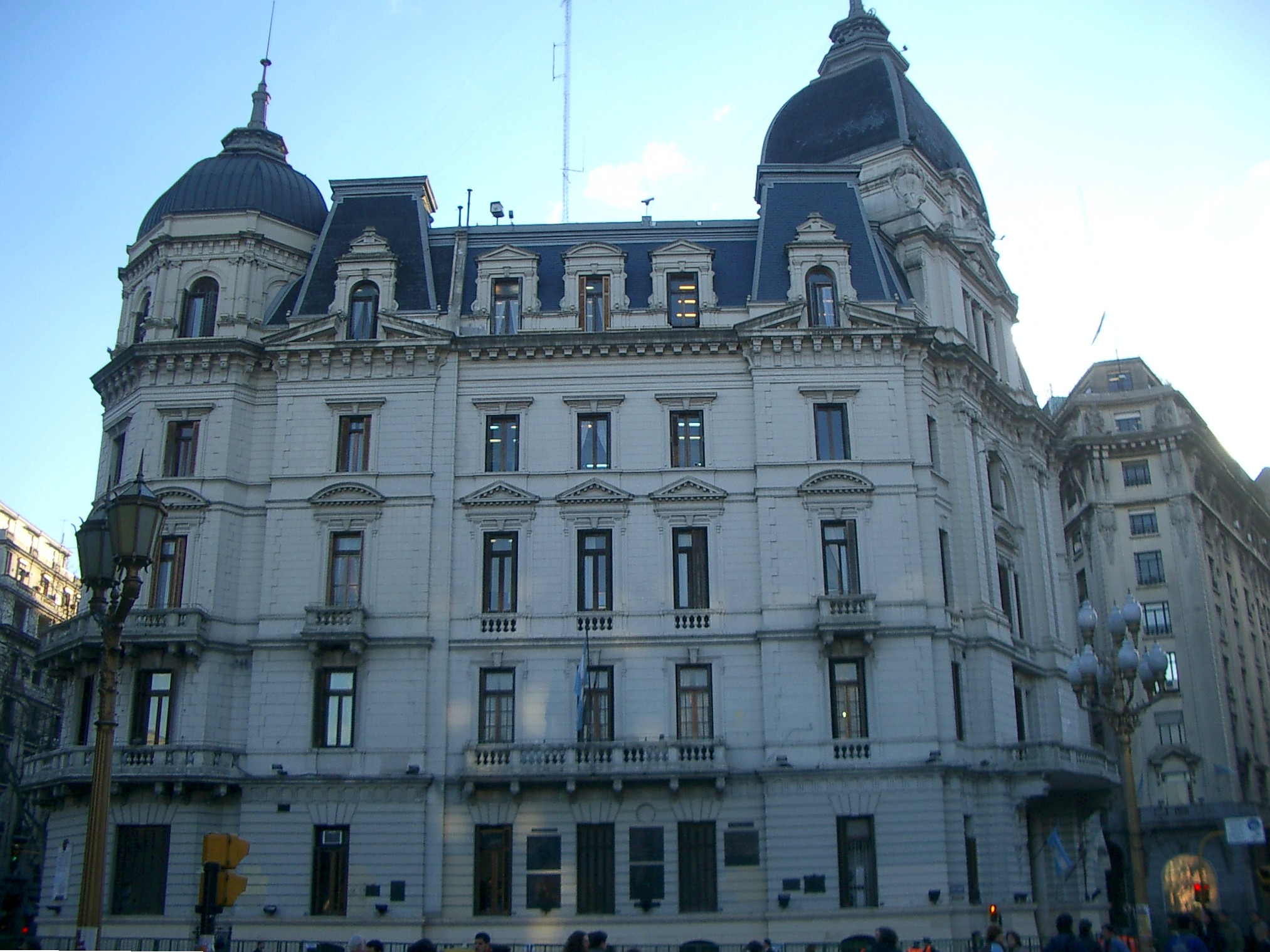 Edificio de la Jefatura de Gobierno de la ciudad, Buenos Aires, Argentina